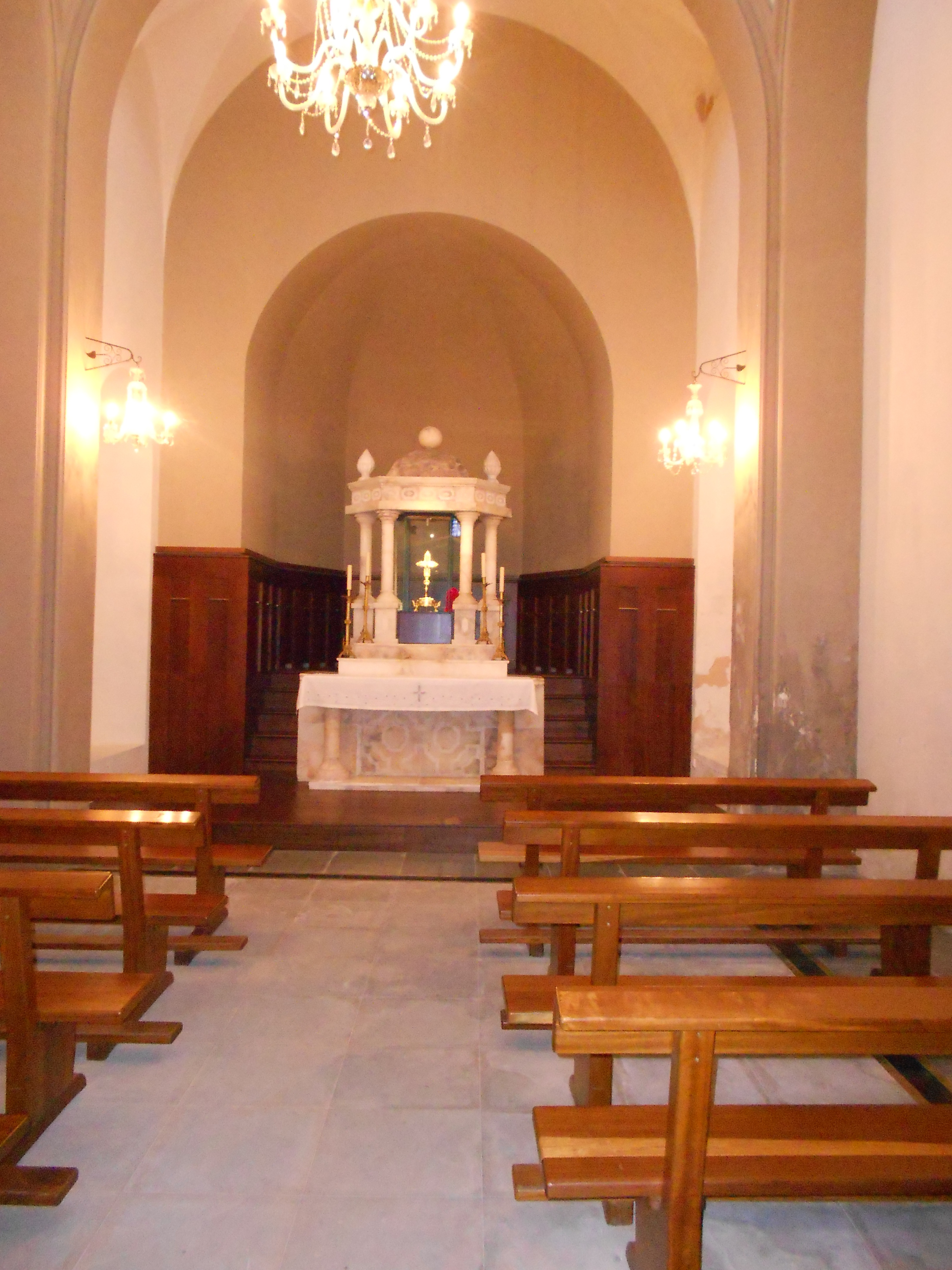 Capilla de la Vera Cruz. Colegiata de Santa María la Mayor (Caspe, Aragón).